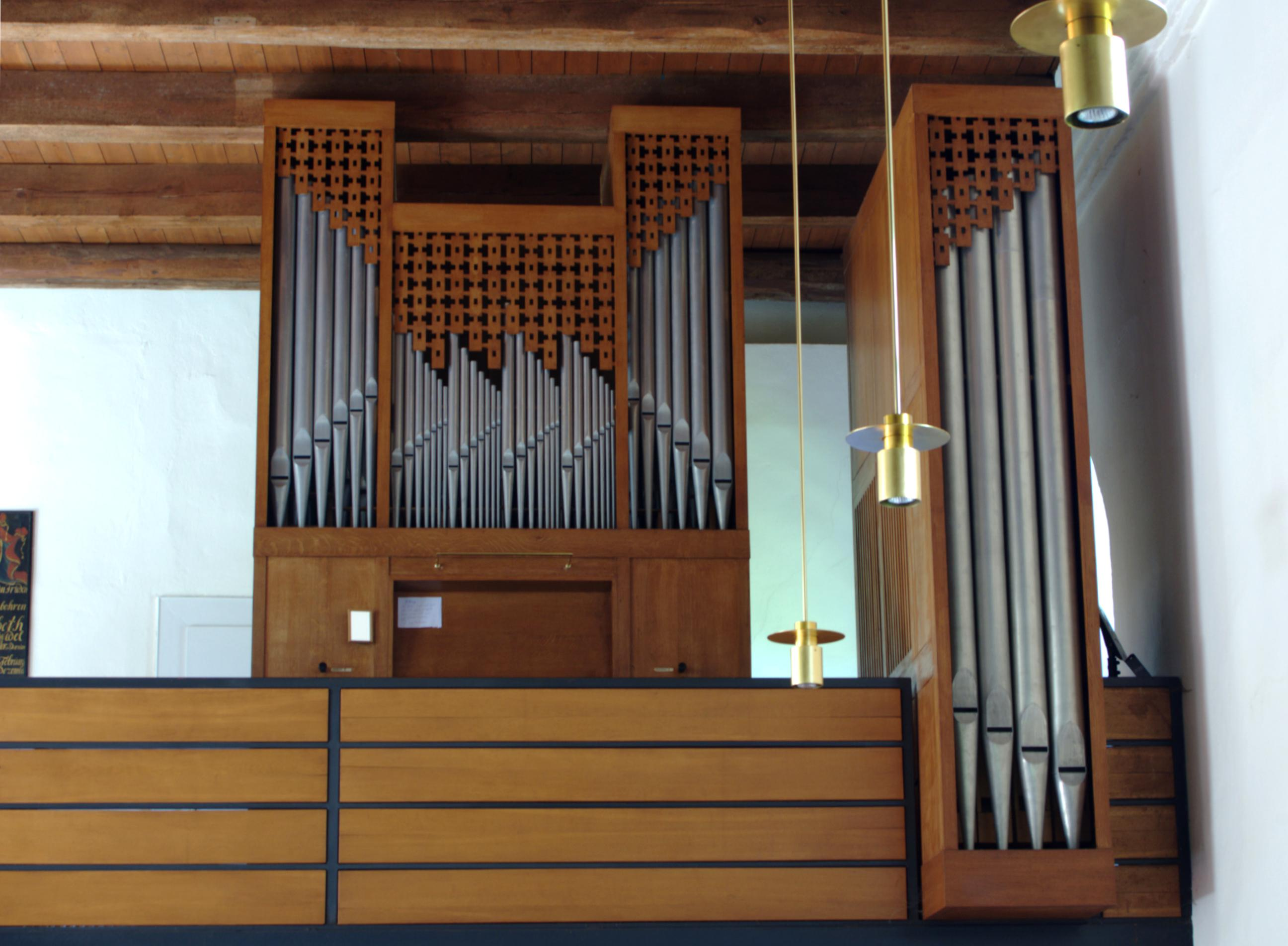 Orgel in Loga, Reformierte Kirche